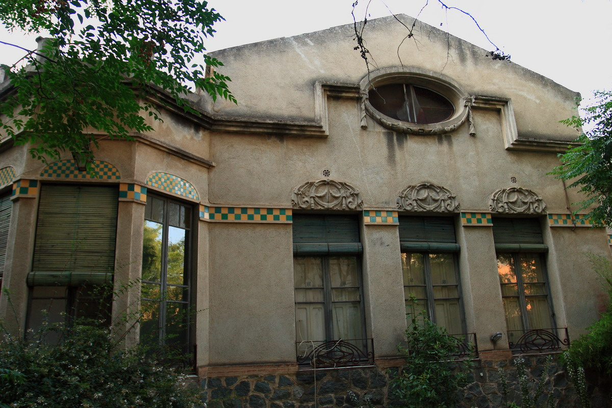 Casa Balvey (Cardedeu-Vallès Oriental-Catalunya), obra de Manuel Raspall 1915